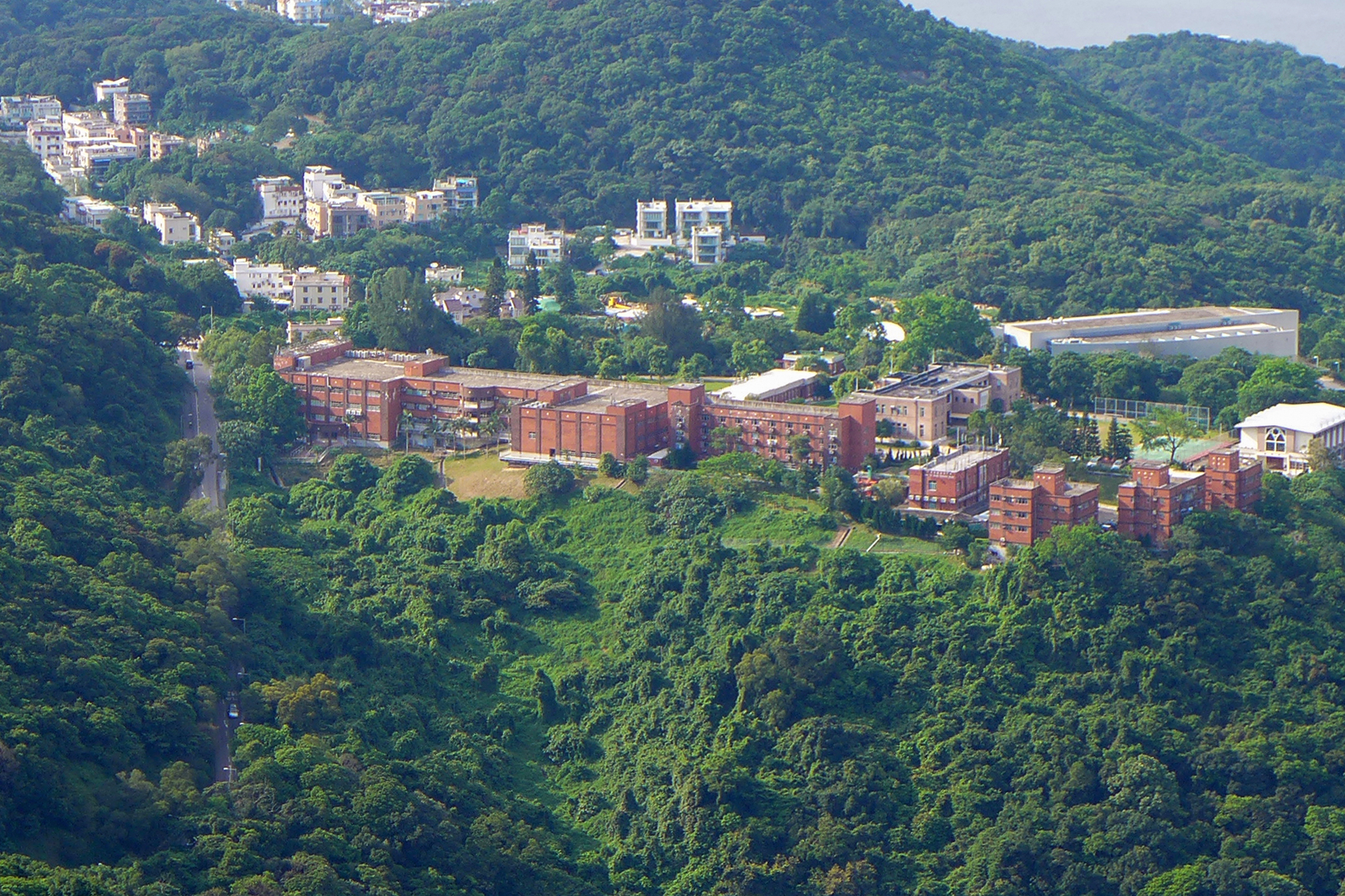 Hong Kong Adventist College